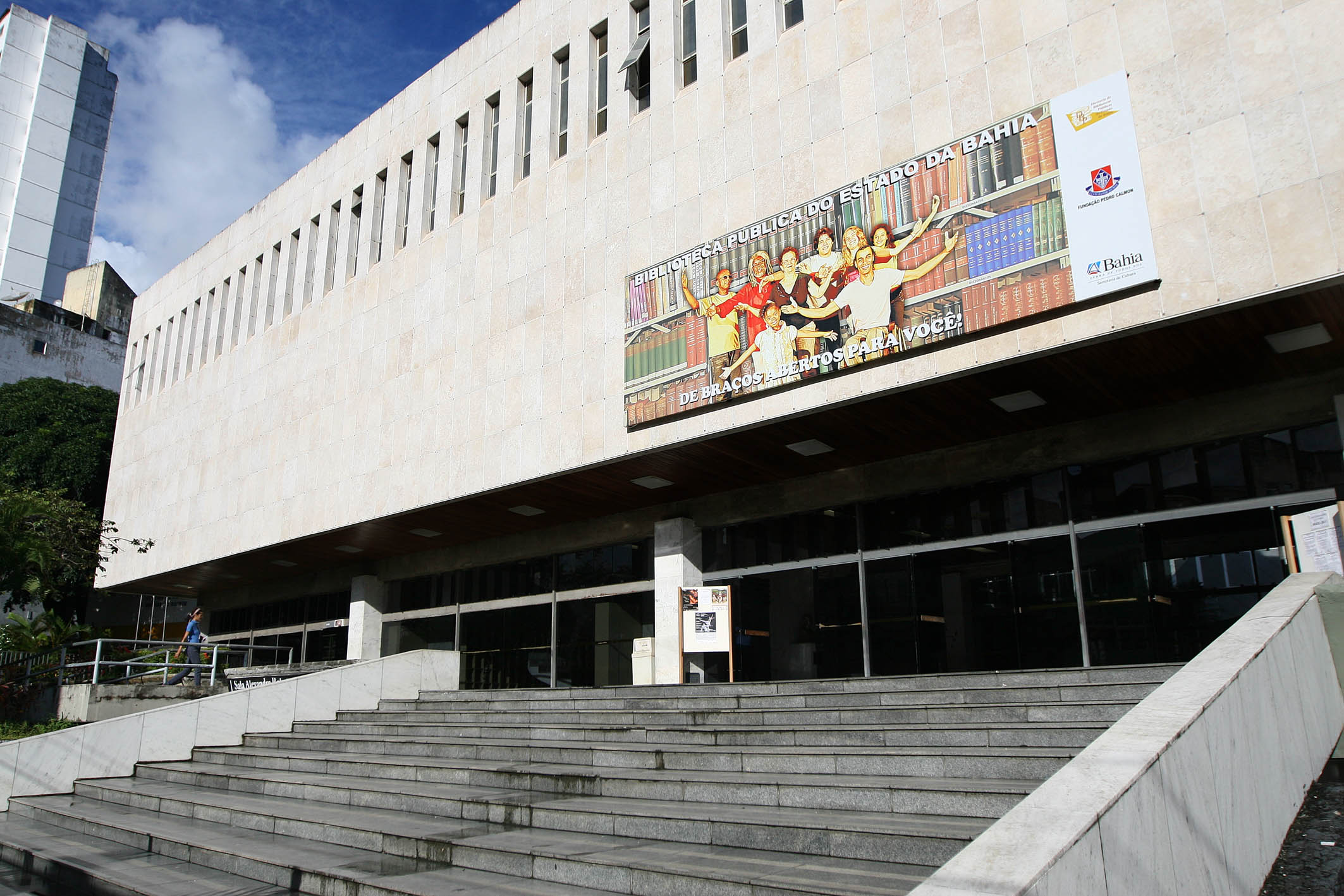 A Biblioteca Pública do Estado da Bahia fica localizada nos Barris. Foto: Ronaldo Silva/SECOM